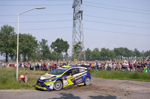 Dennis Kuipers op klassementsproef Spoordonk van de ELE rally 2016